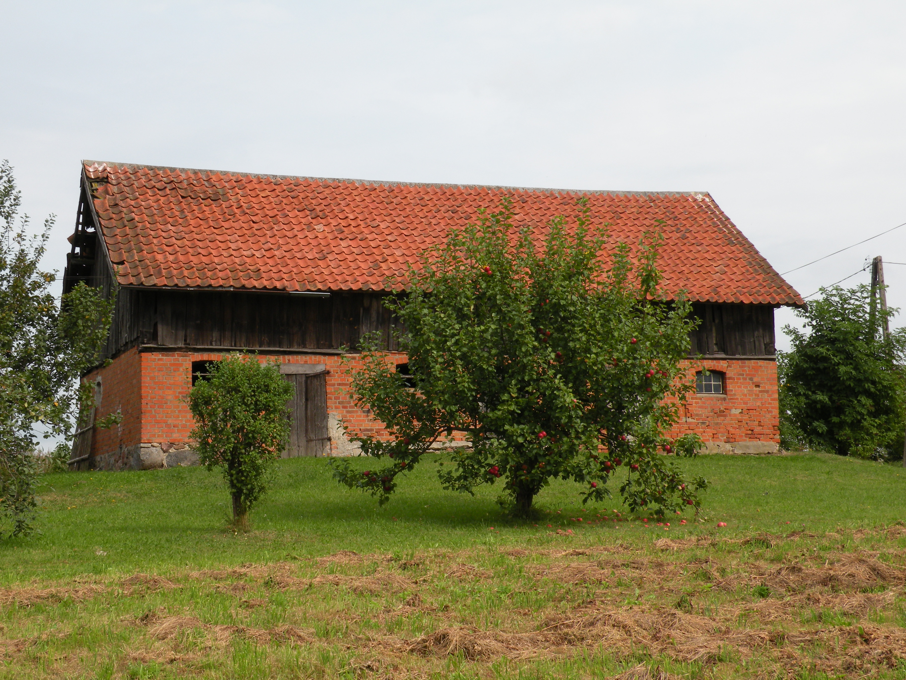 Gady (gmina Dywity), budynek gospodarczy (obora) w środku wsi